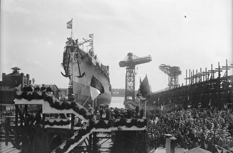 Der feierliche Stapellauf des neuen deutschen Kreuzers Köln auf der Staatswerft in Wilhelmshaven. Die feierliche Taufe wurde unter Anwesenheit des Reichswehrministers Groener ,des Admiral Zenker , dem Oberbürgermeister von Köln Adenauer sowie dem Oberpräsidenten von Hannover Noske und einer vieltausenköpfigen Menschenmenge vollzogen. Der neue [d]eutsche Kreuzer Köln während des feierlichen Stapellaufes auf der Staatswerft in Wilhelmshaven.